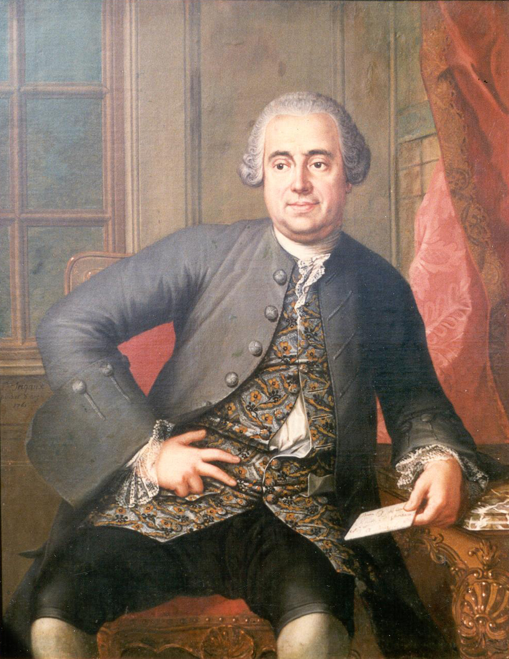 portrait de Jean-Baptiste van Dievoet (1704-1776) époux d'Elisabeth van der Meulen (1720-1769), peint à l'huile par Trigaux, Bruxelles, 1761